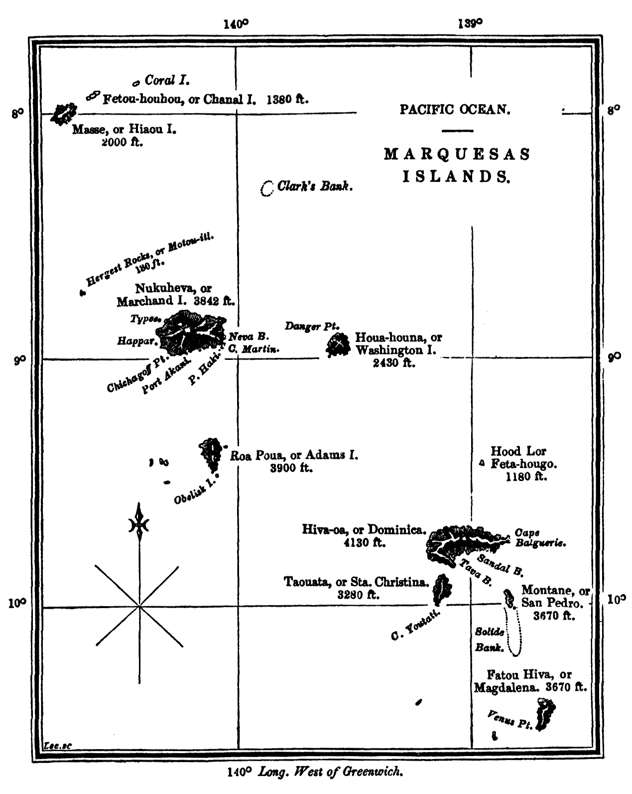 Map of Marquesas_Islands. In: Herman Melville: Narrative of a four month’s residence among the natives of a valley of the marquesas islands; or, a peep at polynesian life. John Murray, London 1846